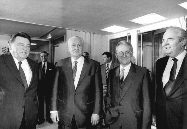 ADN-ZB Schmidtke-10.4.86 BRD: Begegnung- Das Mitglied des Politbüros und Sekretär des ZK der SED, Günter Mittag (2.v.l.), Stellvertreter des Vorsitzenden des Staatsrates der DDR, hatte in Bonn eine Begegnung mit dem bayerischen Ministerpräsidenten Franz Josef Strauß (1.v.l.). An der Unterredung nahmen auch teil Staatssekretär Dr. Gerhard Beil (2.v.r.) und Botschafter Ewald Moldt (1.v.r.).